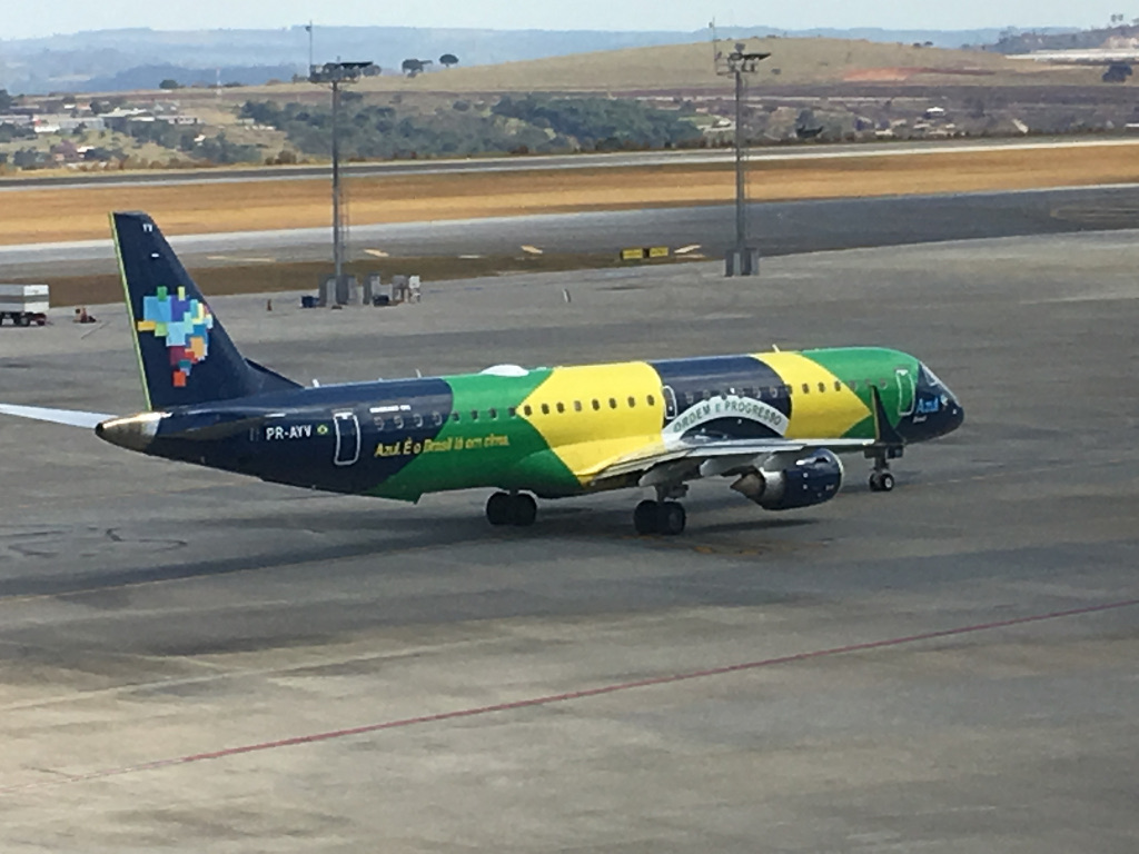 PR-AYV da Azul, no Aeroporto Internacional de Belo Horizonte / Tancredo Neves